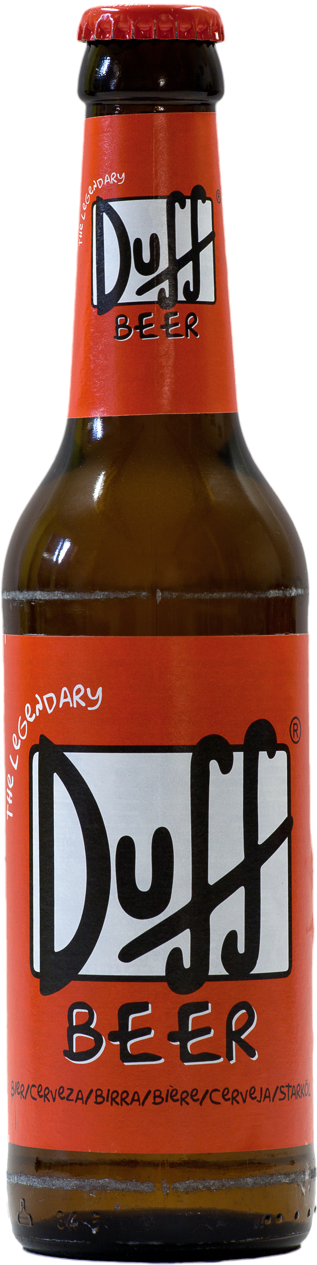 Duff Beer Flasche - Vorderansicht. Von der deutschen Duff Beer UG in Gotha, Thüringen vertrieben und bei der Andreas Klosterbrauerei Eschwege GmbH in Eschwege, Hessen gebraut.